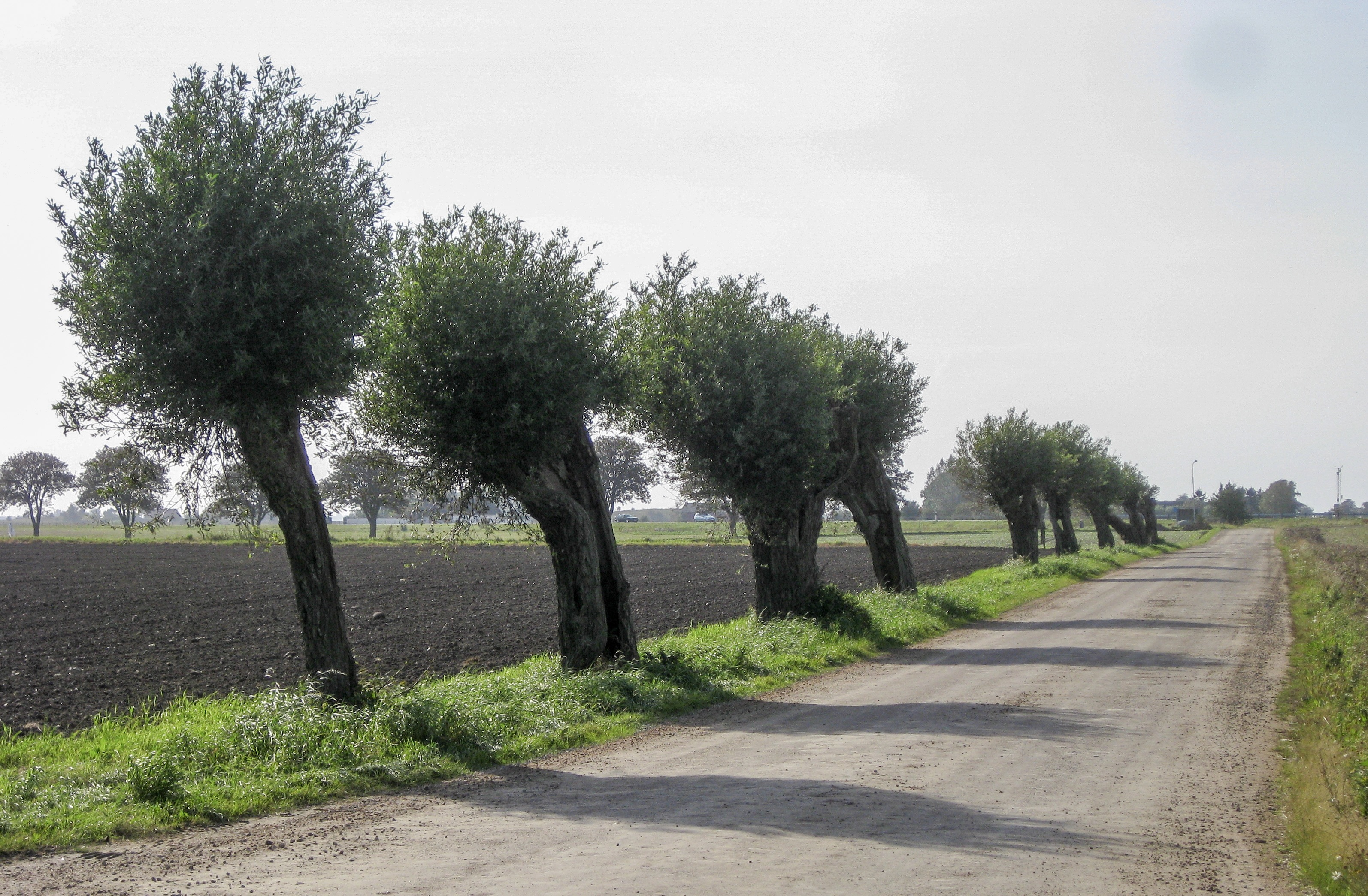 Pilevall i Vellinge kommun